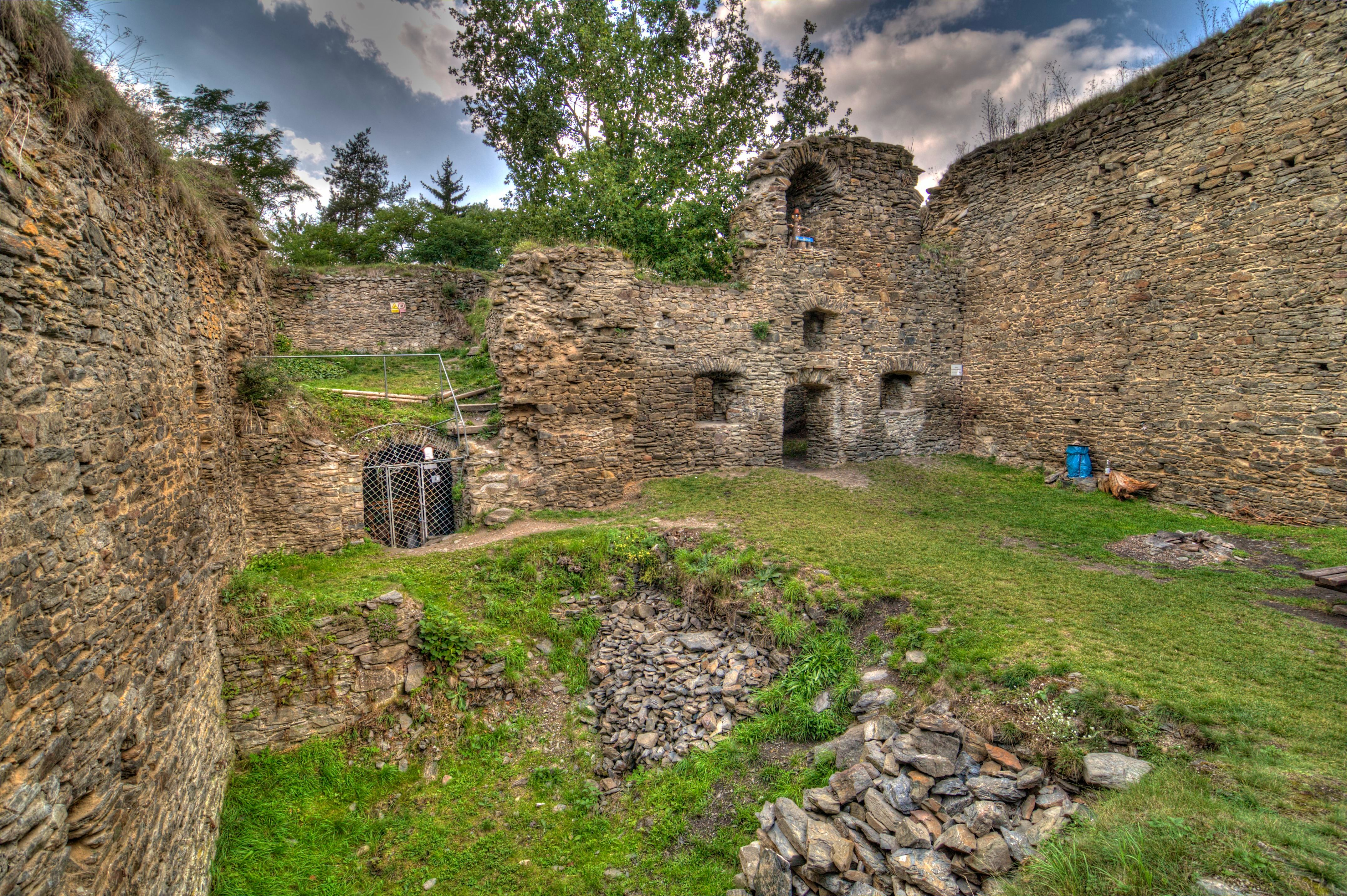 Nádvorní zeď paláce od jihovýchodu